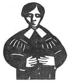 Skyggebilde laget av P. A. Munch.